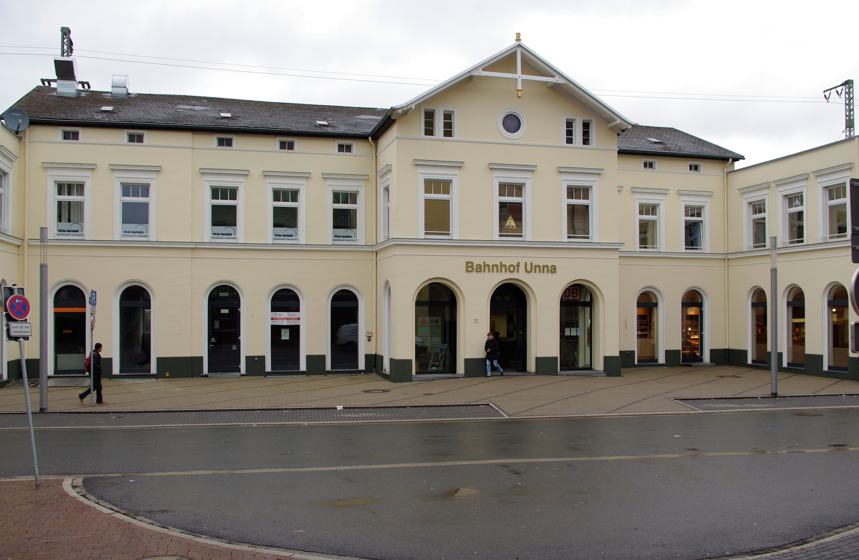 Bahnhof Unna 2011, Bahnhofstraße, Hauptgebäude